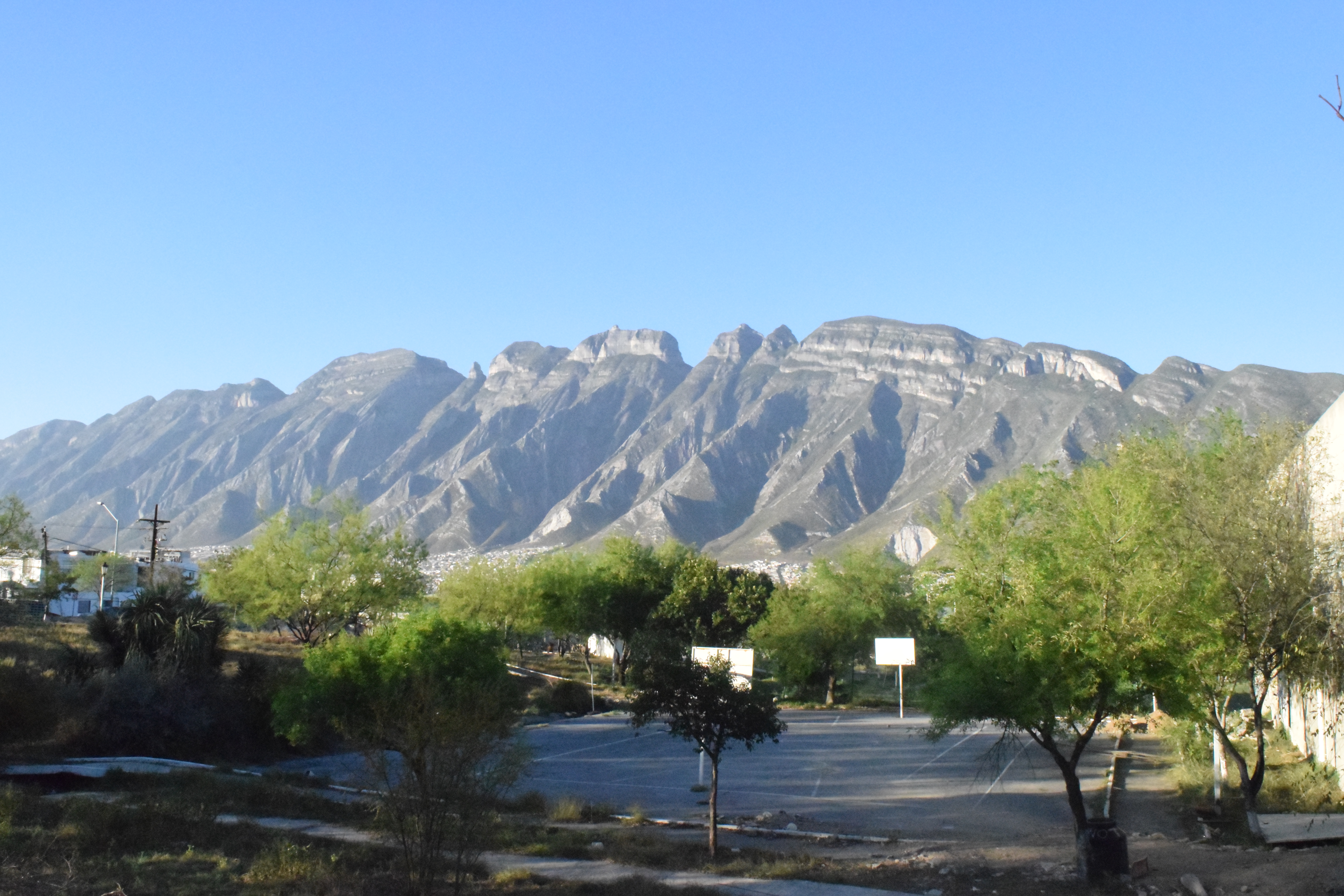 Vista del cerro de las mitras en la colonia san pedro.